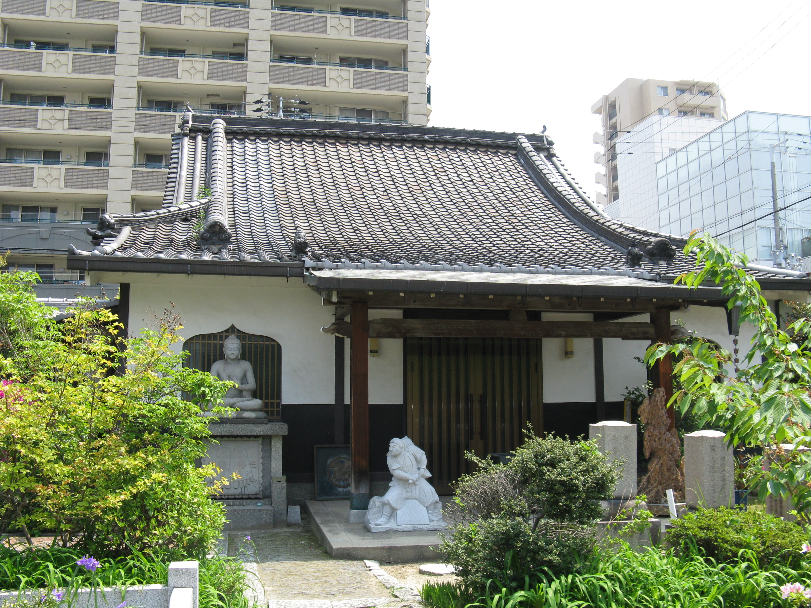 吉祥寺 本堂